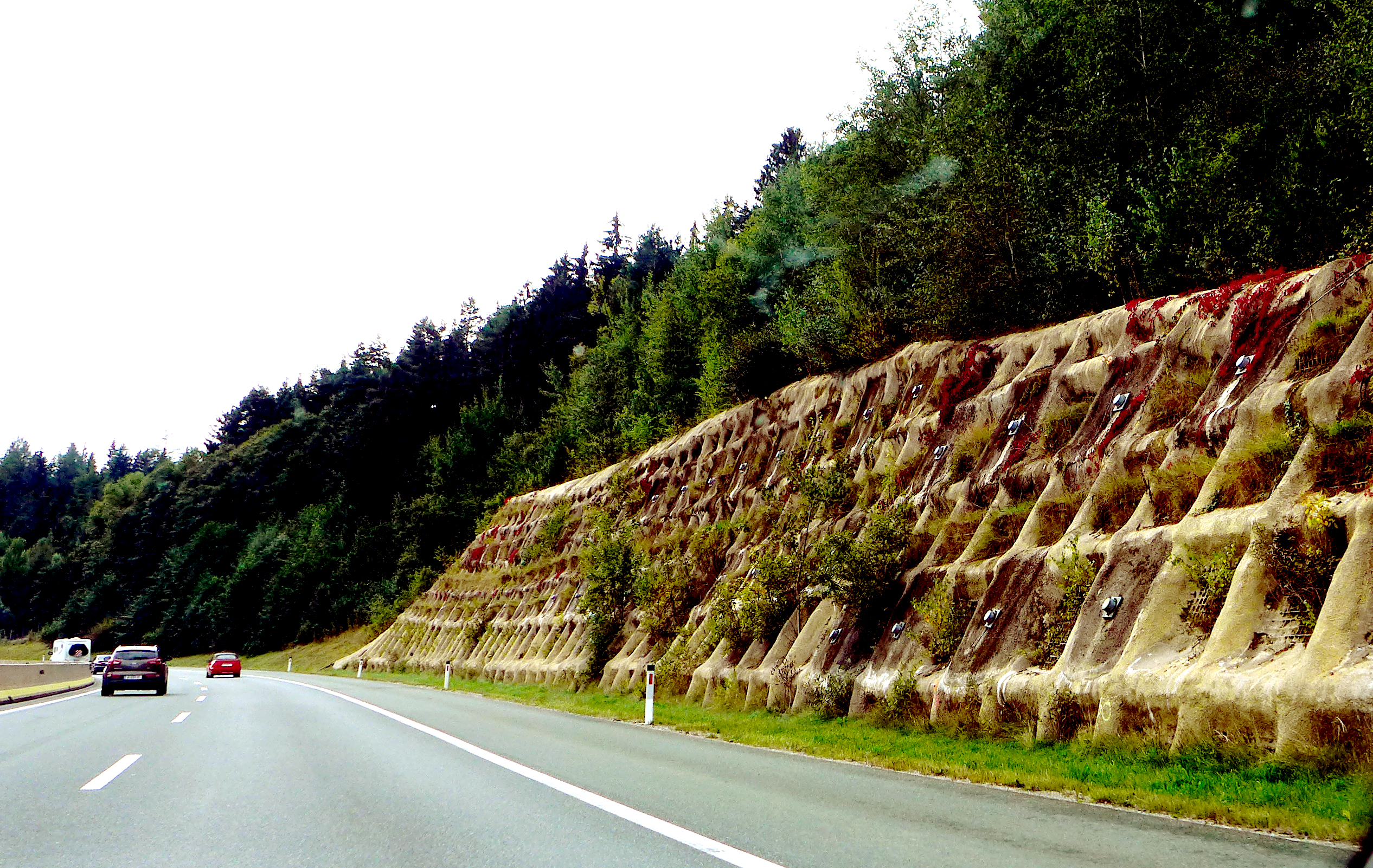 Packsattel-Modriach, sziklabevágás hegy felőli védműve (A2-es autópálya, Ausztria)